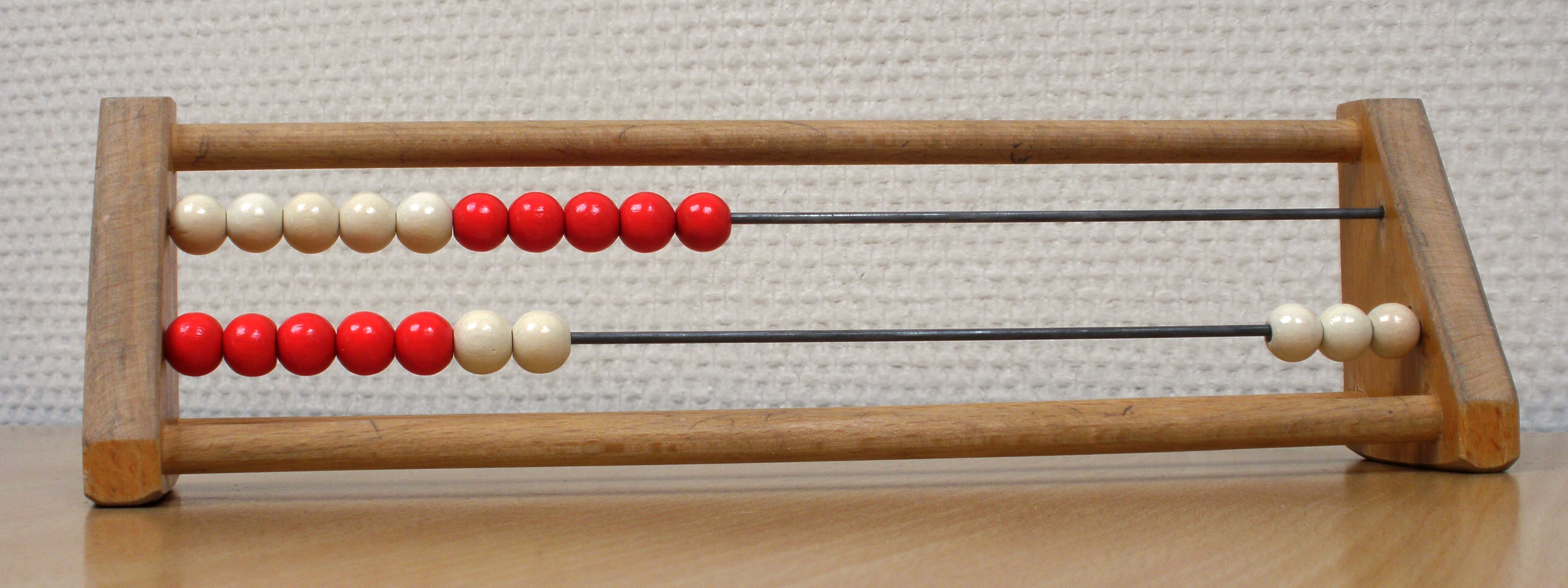 Een telraam zoals dit gebruikt wordt op sommige scholen als hulpmiddel bij het leren rekenen.